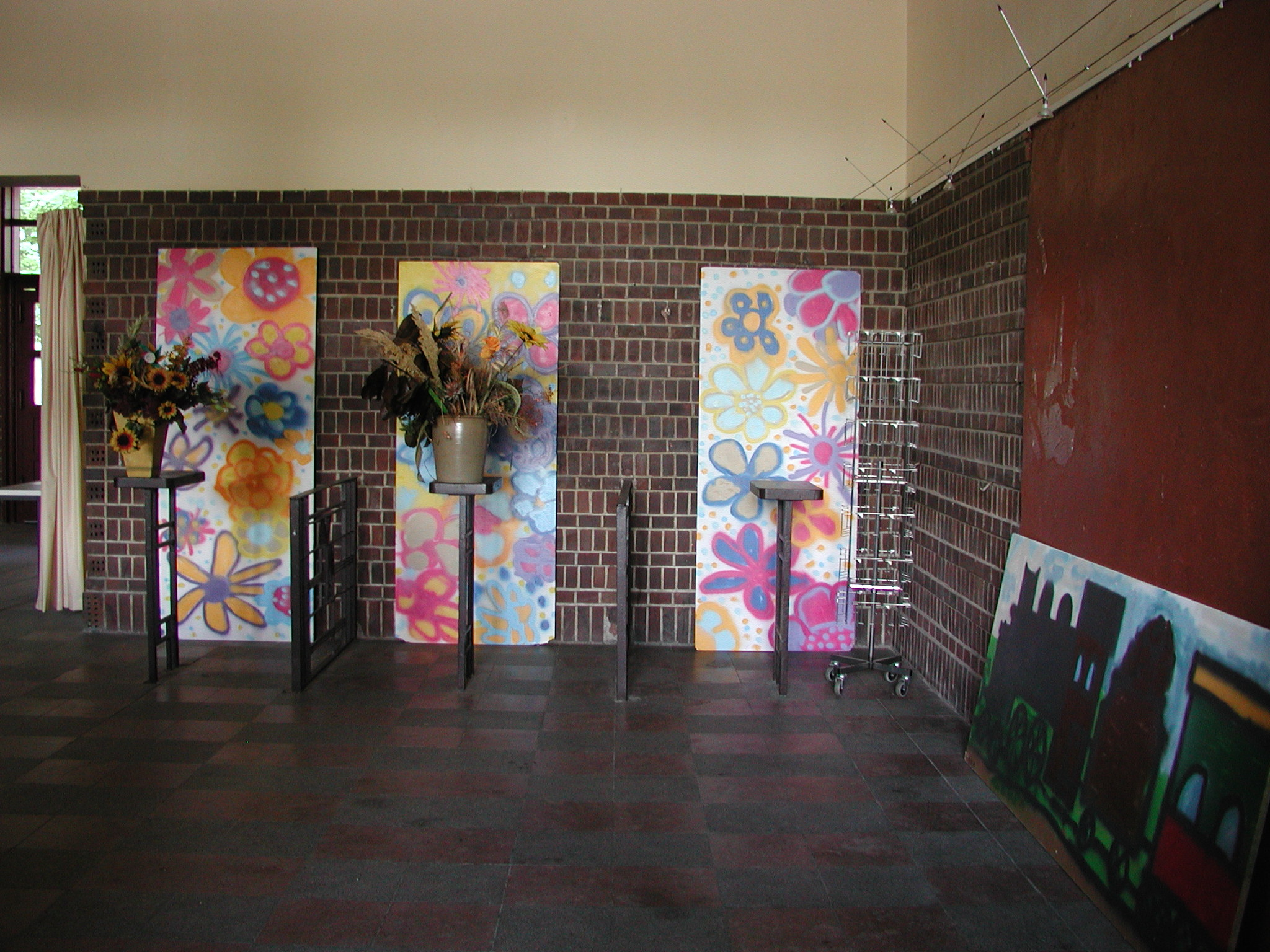 Kultur im Bahnhofsgebäude Wandlitzsee